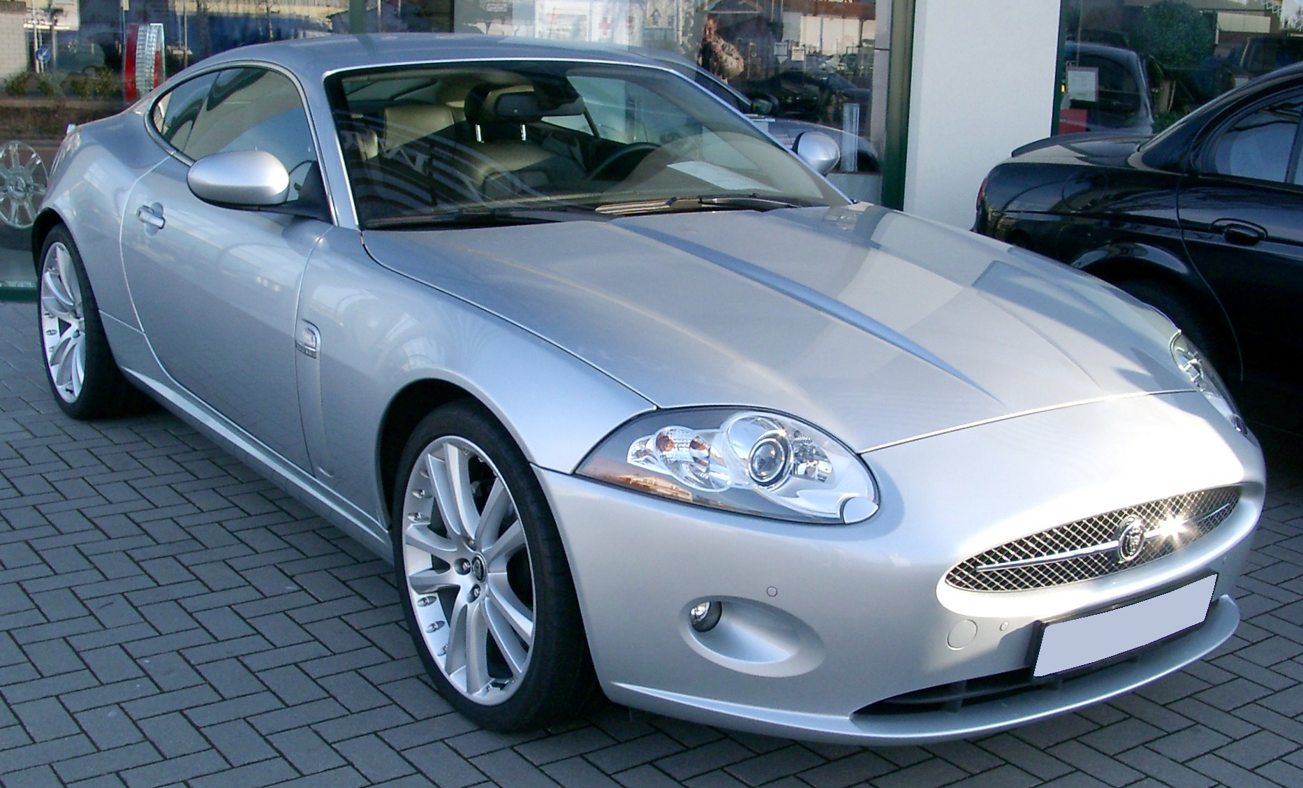 Jaguar X150 (XK 4.2 L V8 Coupe)